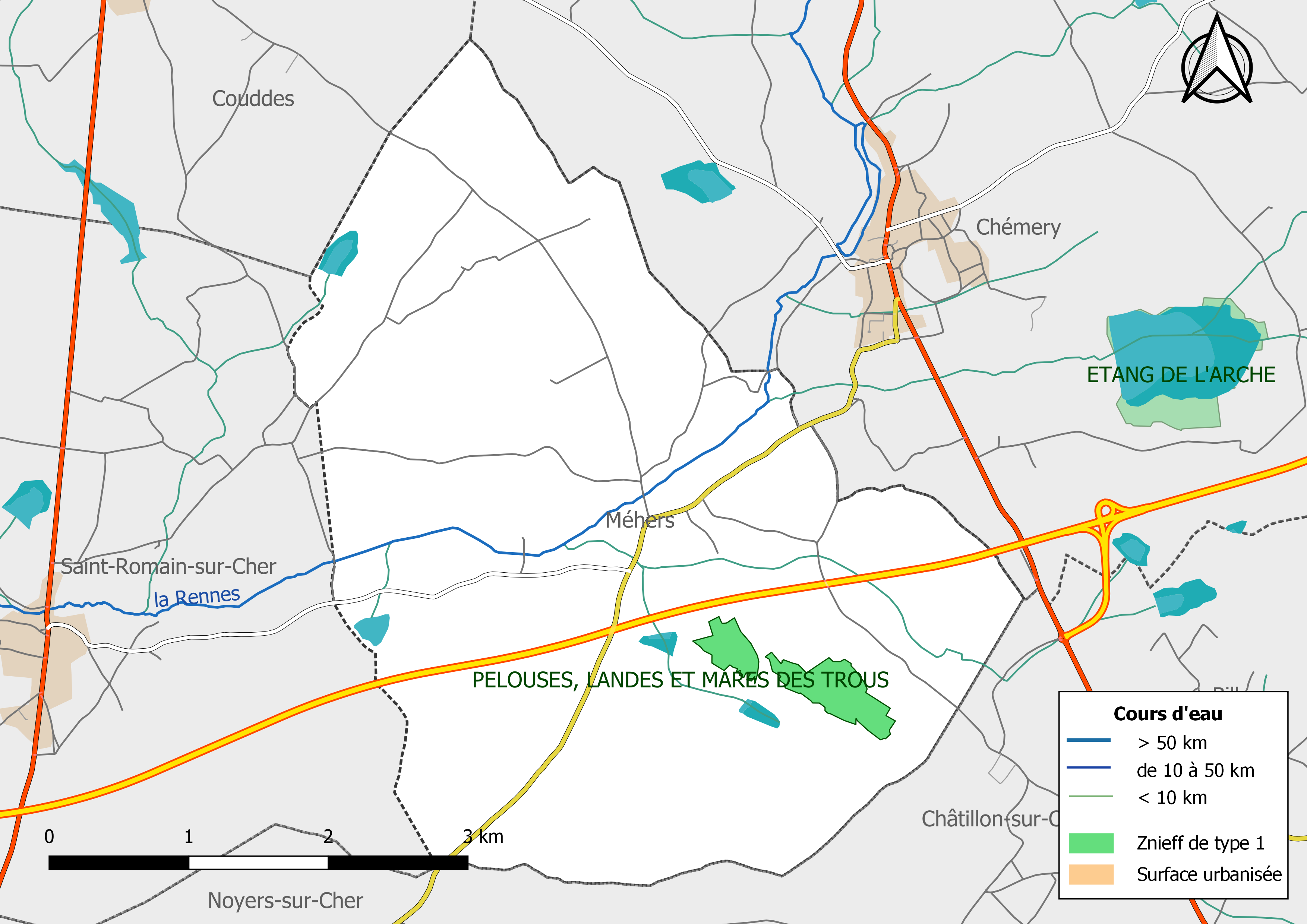 Zones naturelles d'intérêt écologique faunistique et Floristique (ZNIEFF) de type 1 de la commune de Méhers. (Loir-et-Cher, France).